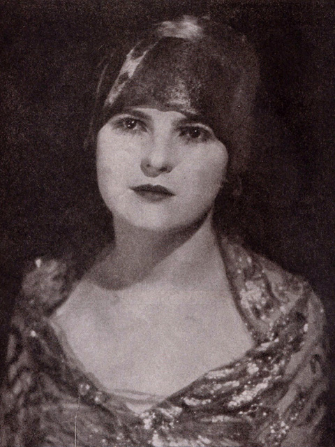 Molly Malone, actrice du cinéma muet américain.